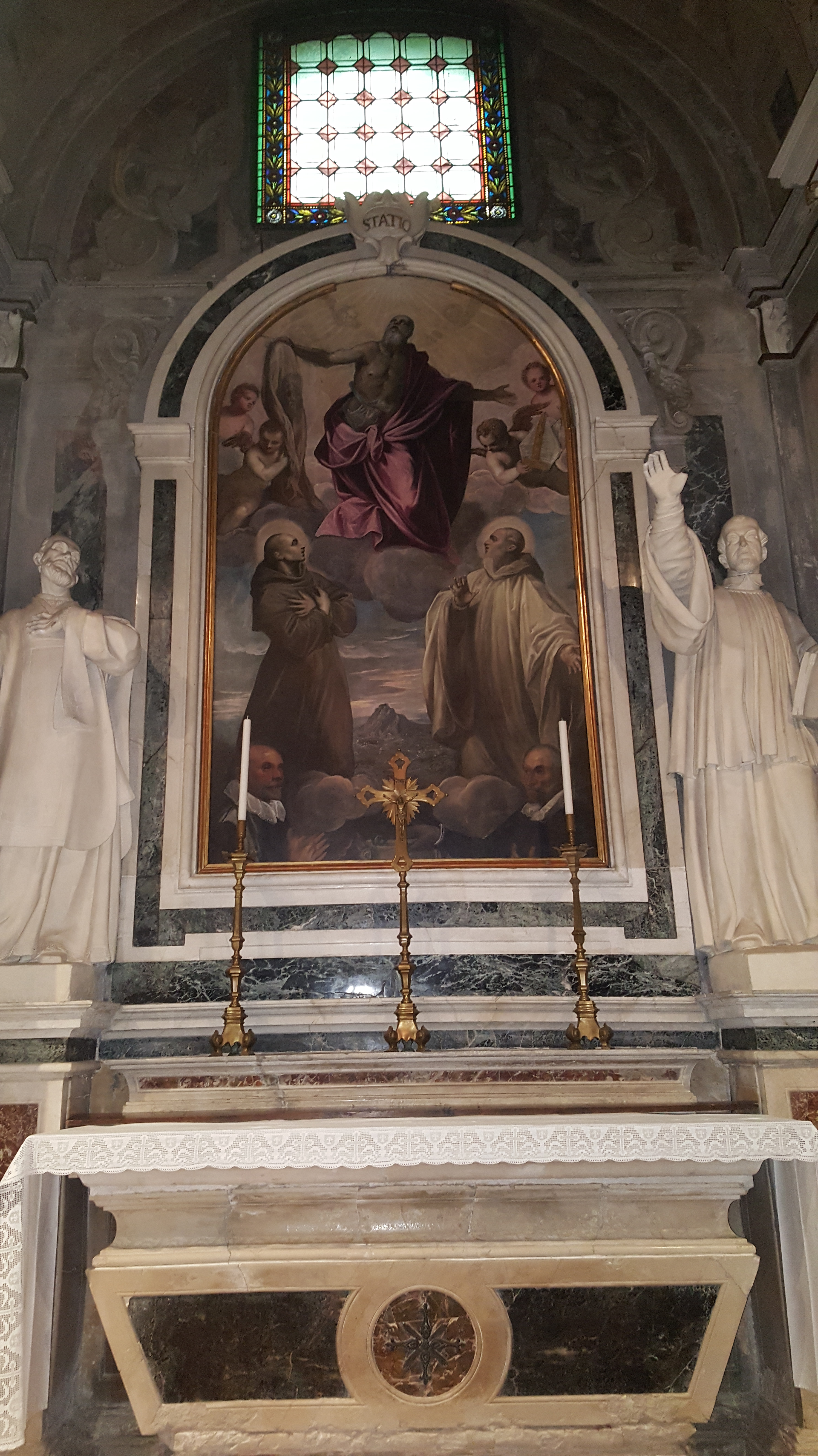 Lendinara, chiesa di San Biagio: interno, altare di san ??? affresco, famiglia Malmignati.